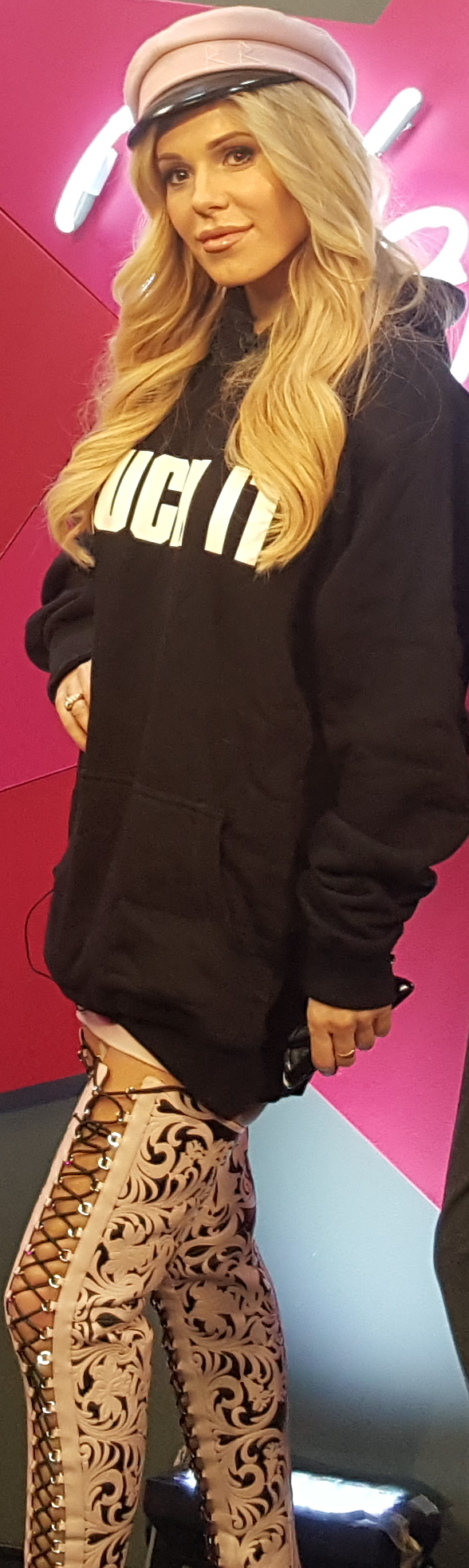 Polska piosenkarka Dorota "Doda" Rabczewska w 2018 roku.